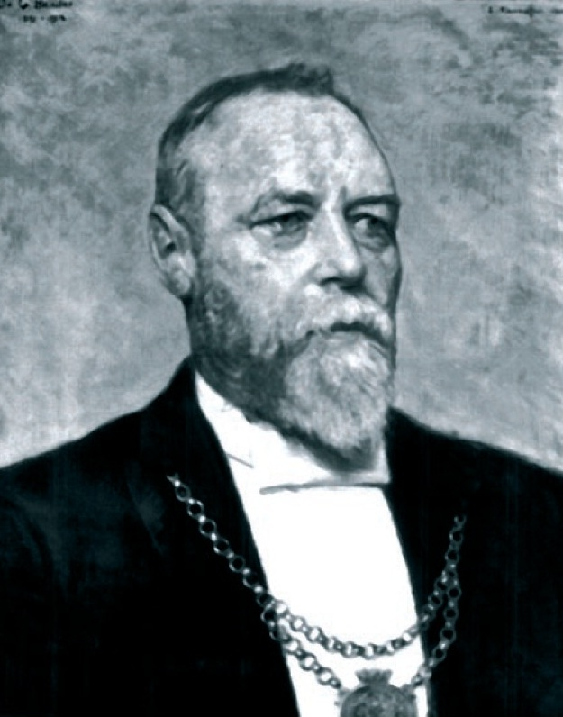 Bildnis Georg Bender (1848–1924), Oberbürgermeister von Breslau